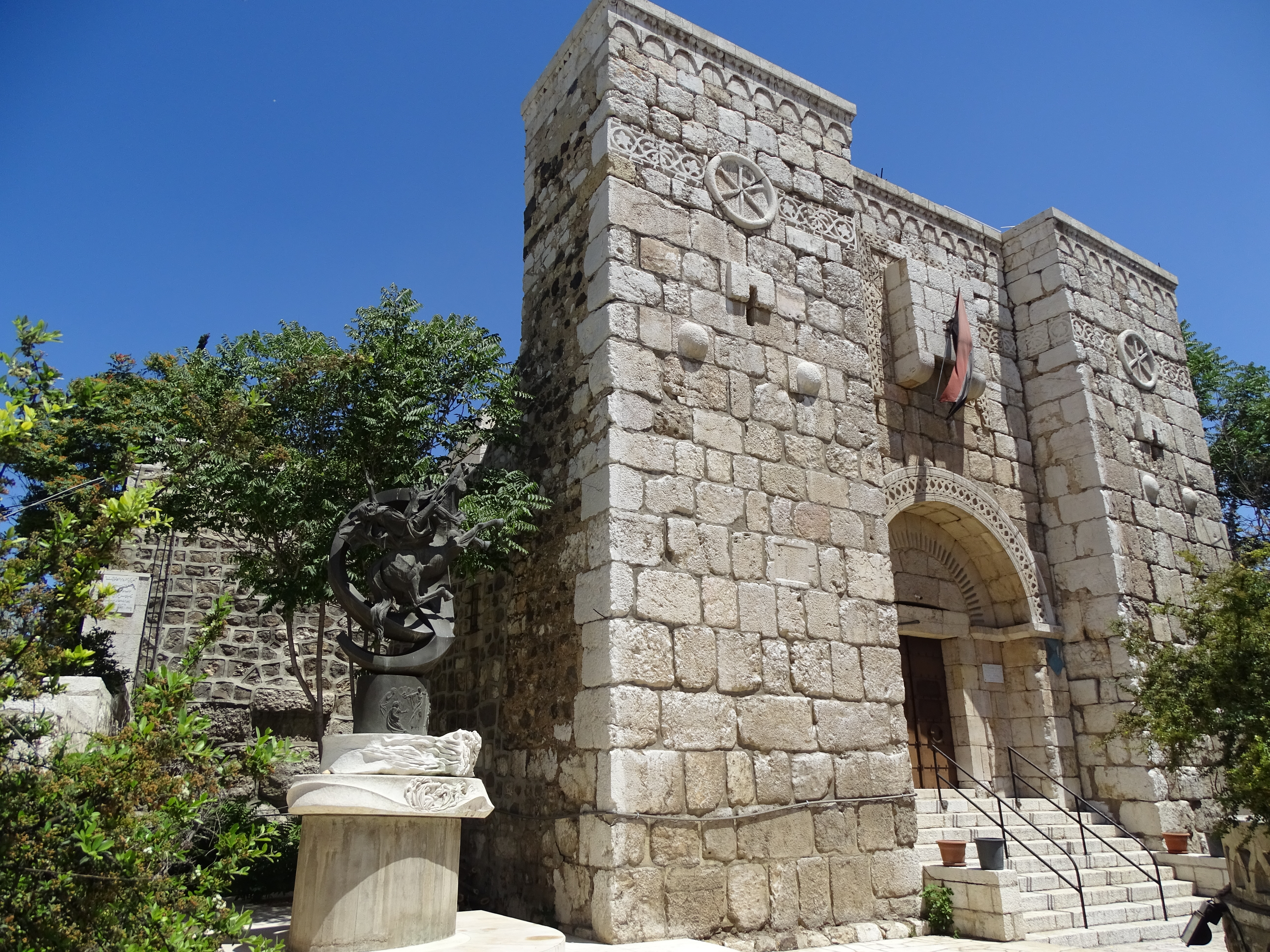 Szent Pál kapuja és kápolnája